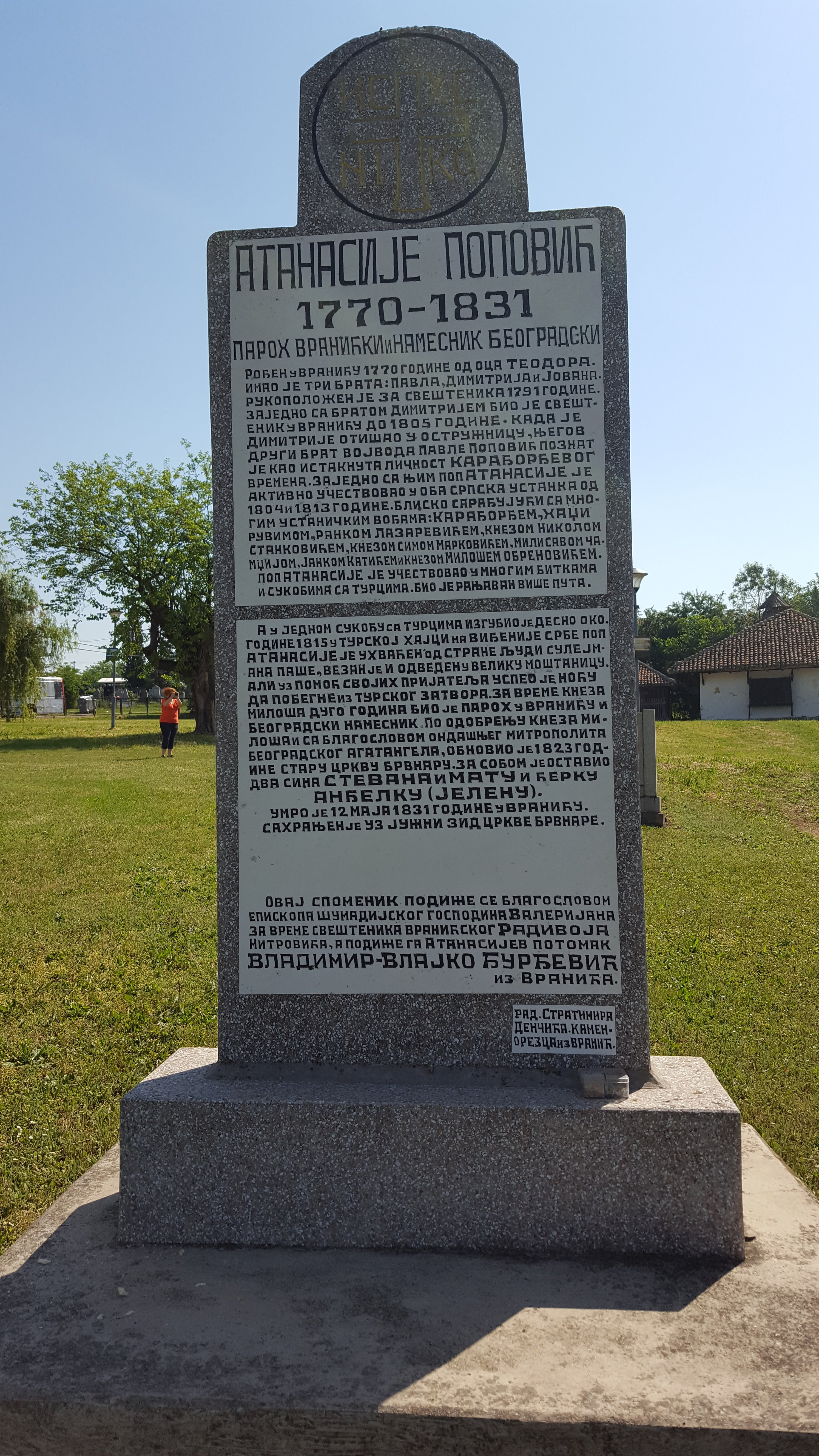 Dvorište Crkve Svetog Ilije u Vraniću